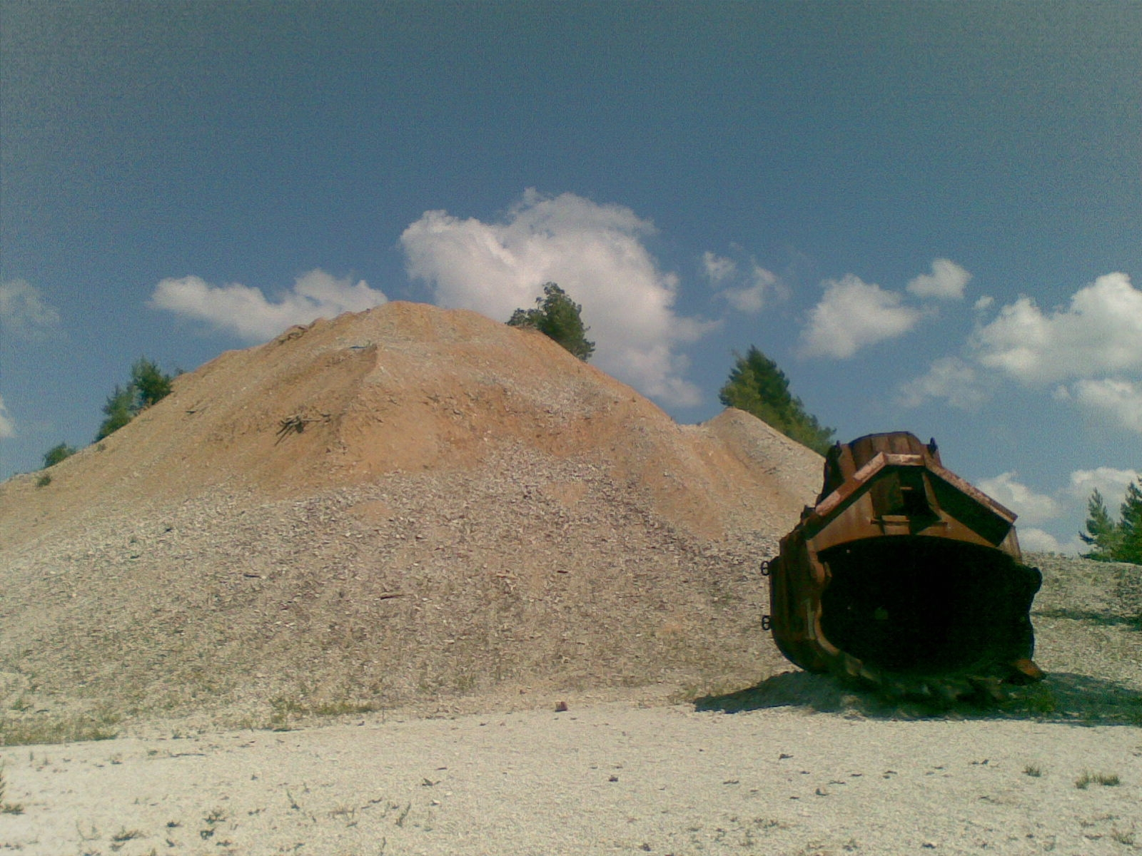 Aherainemägi ja mahajäetud kopp Kohtle-Nõmmel, kaevanduspark-muuseumi lähistel